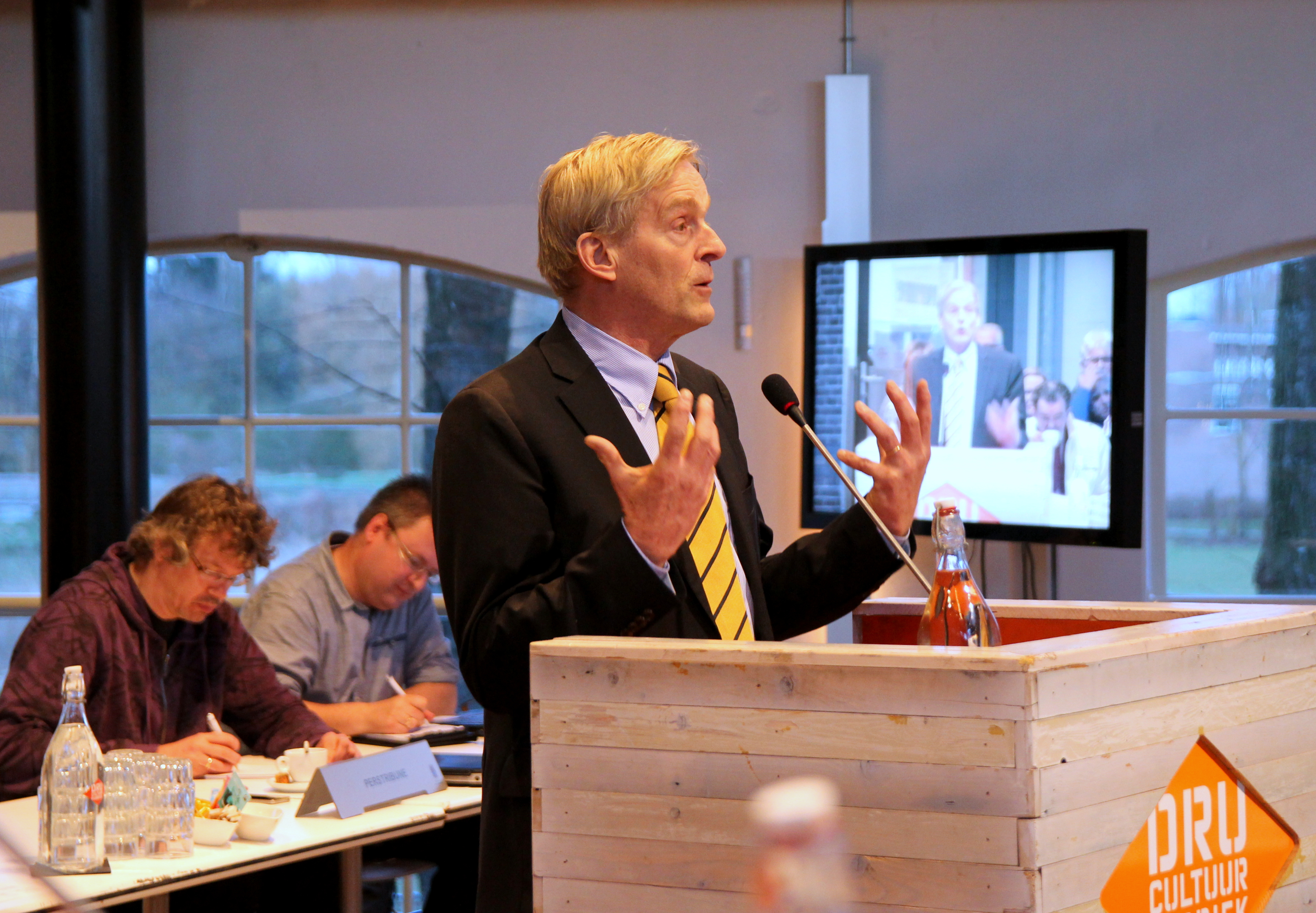 Raadsvergadering in de gemeente Oude IJsselstreek. Eerste zitting met de nieuwe (waarnemende) burgemeester Steven de Vreeze.